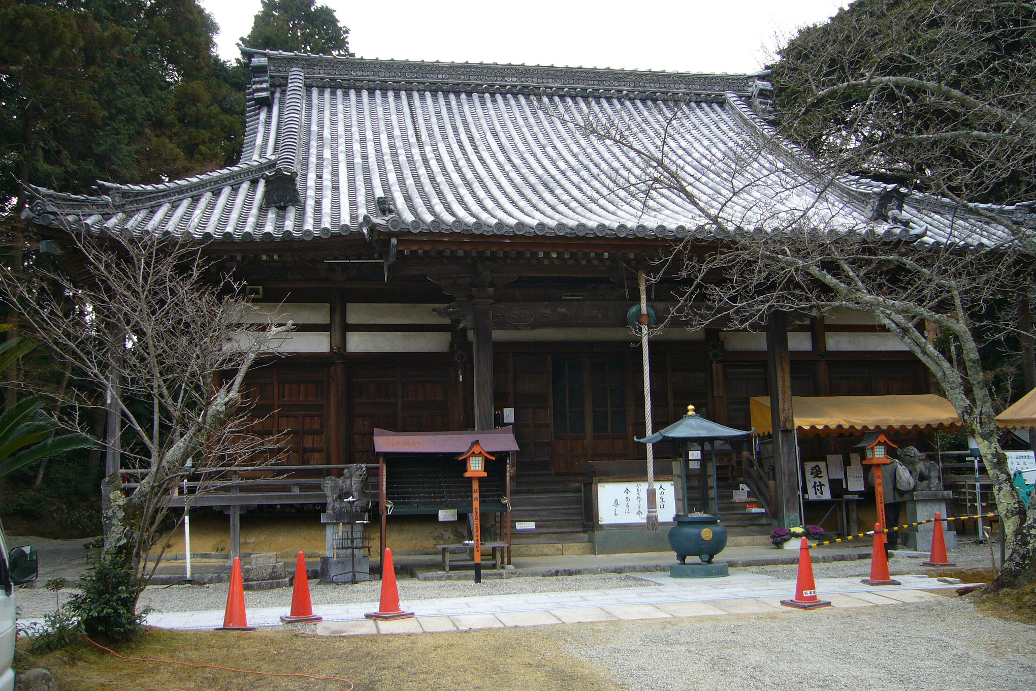 Kaijusenji, Kamo, Soraku-gun, Kyoto, Japan